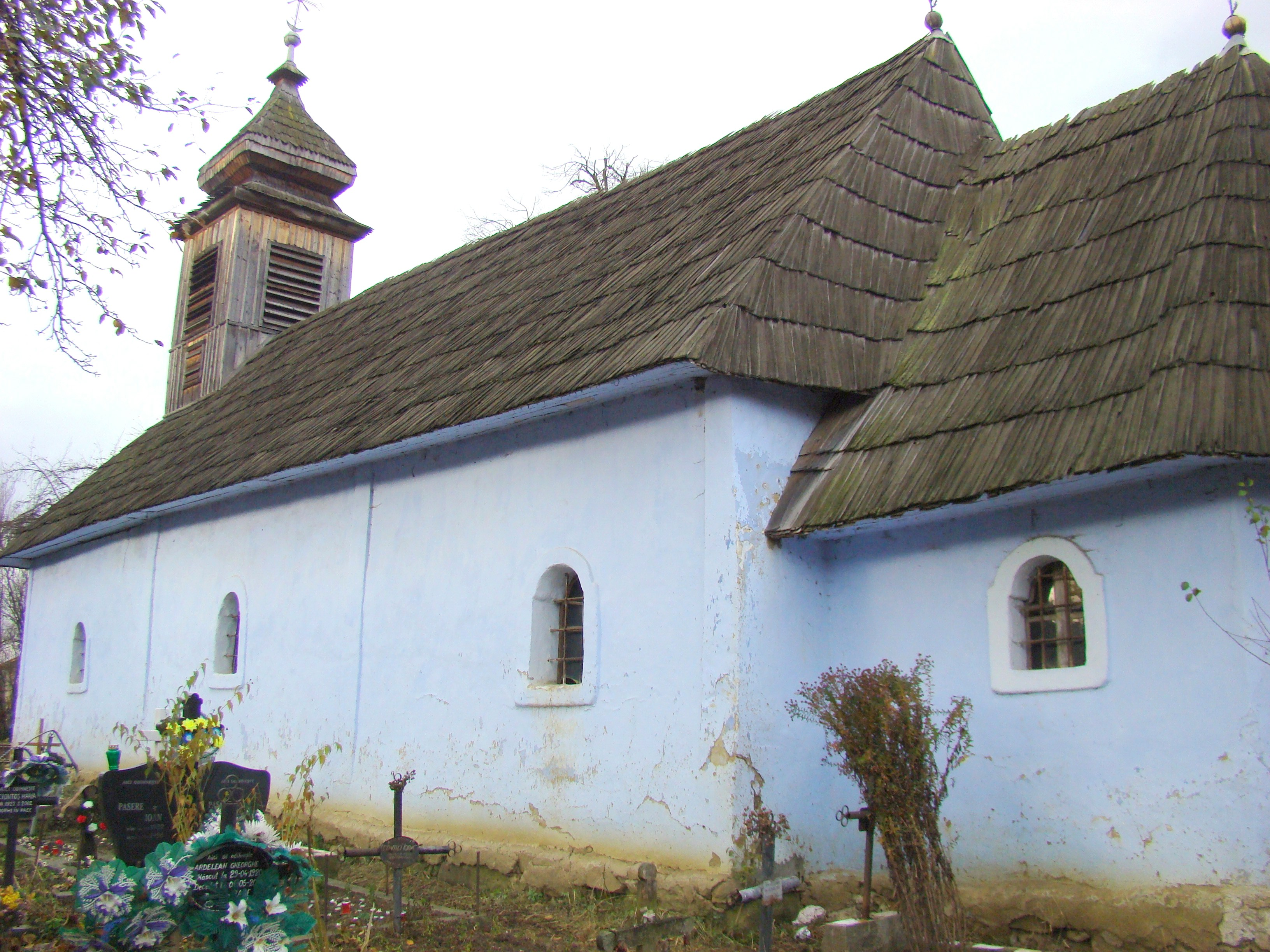 Biserica de lemn „Sf. Arhangheli Mihail și Gavril”